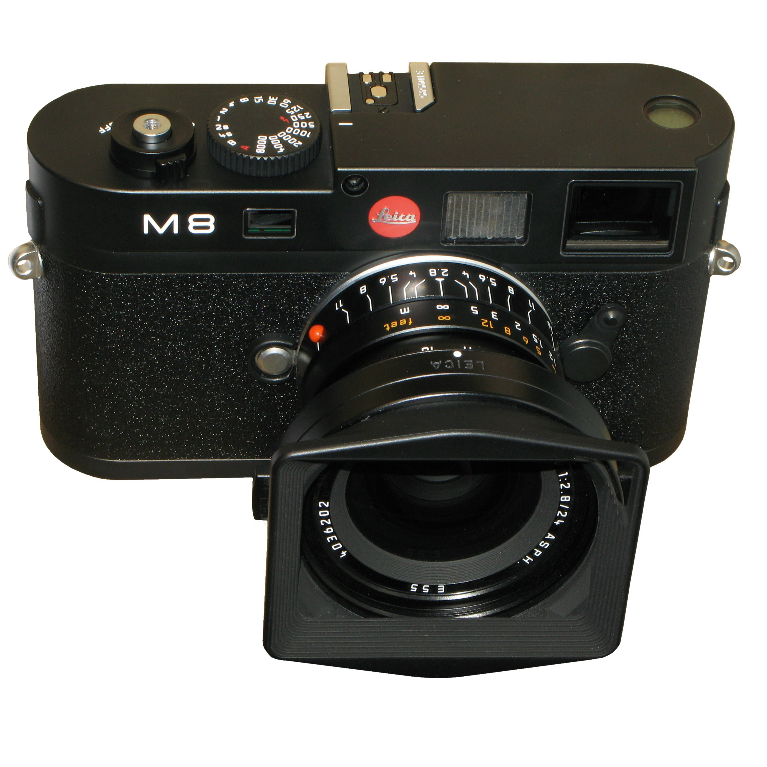 Leica M8